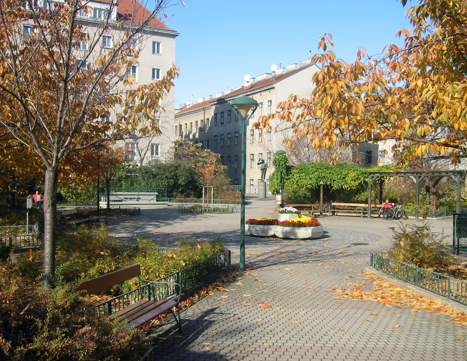 Wien, Fiakerplatz